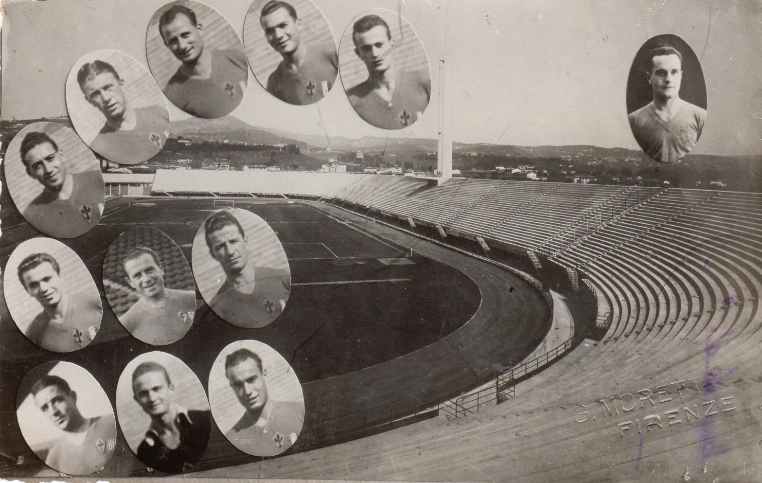 Fiorentina1940